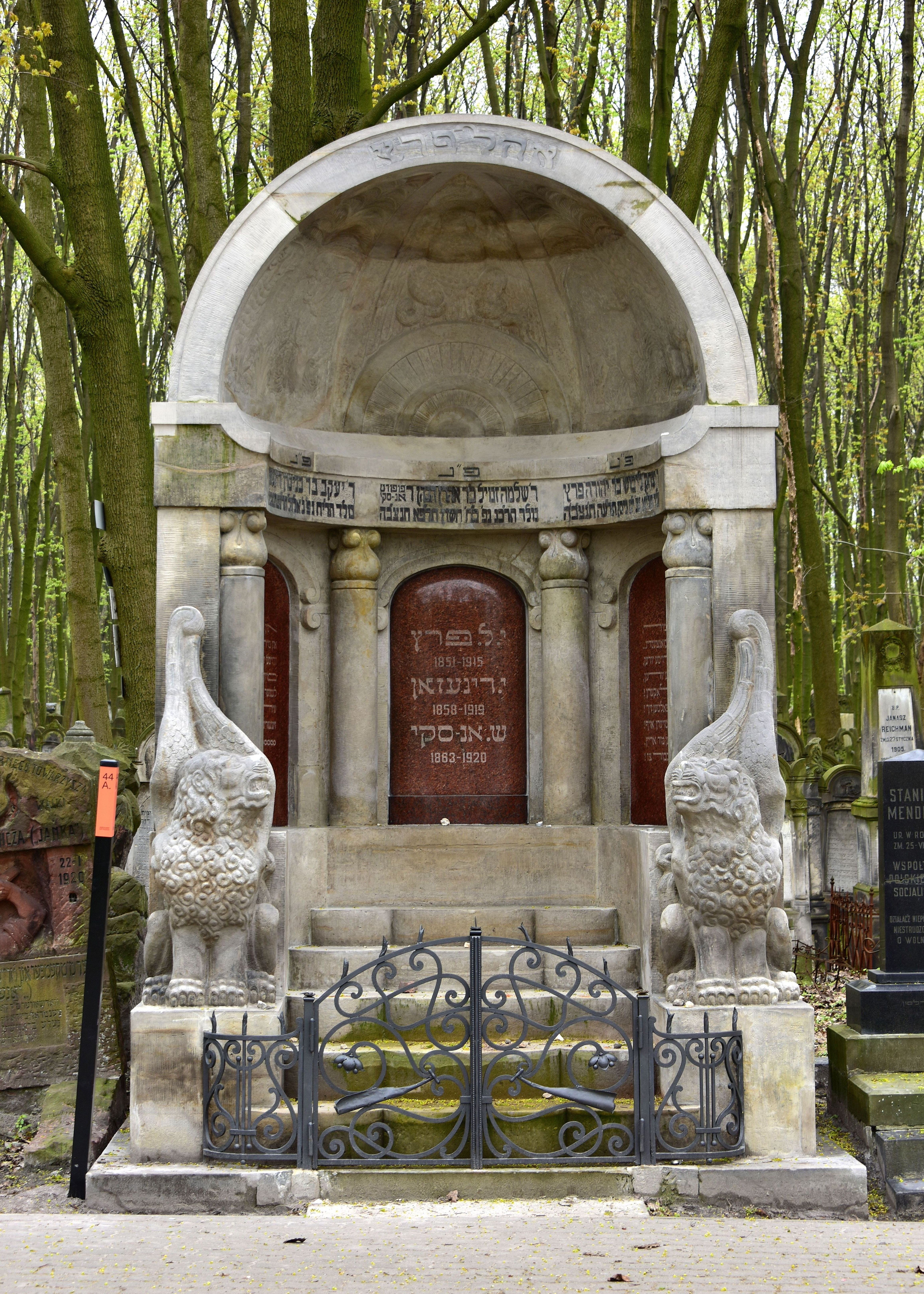 Mauzoleum Trzech Pisarzy na cmentarzu żydowskim w Warszawie